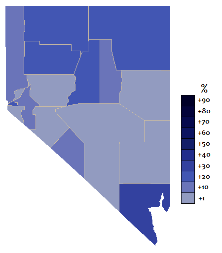 Nevada español por condados